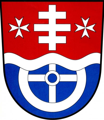 znak, Nišovice, okres Strakonice